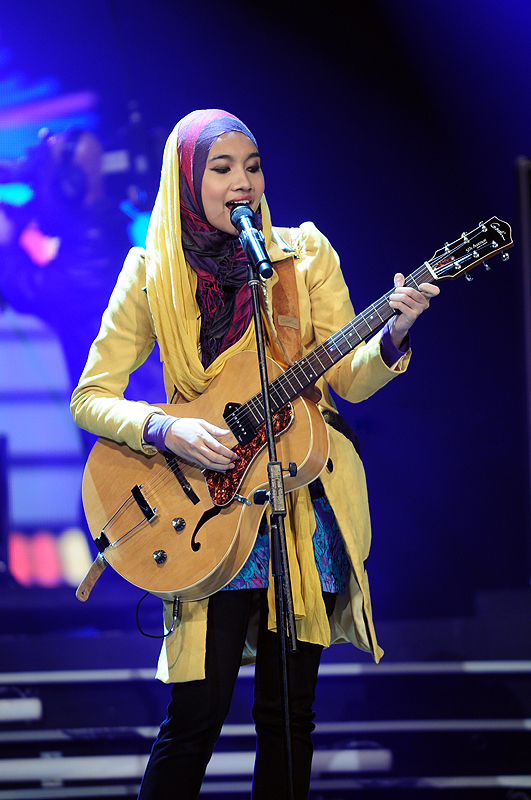 Yuna (singer) at the Rehearsal Anugerah Juara Lagu 24.